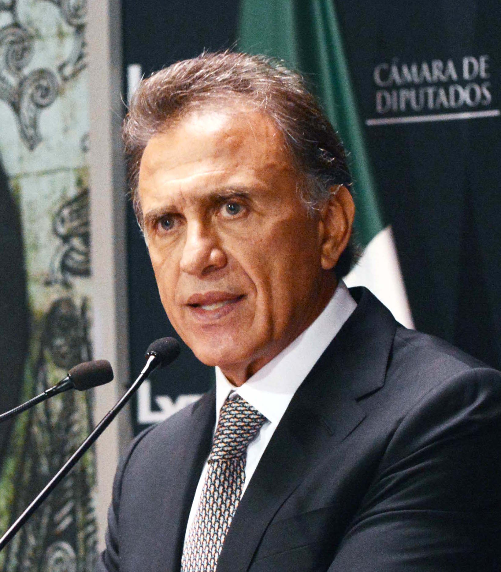 Dip. Miguel Ángel Yunes Linares